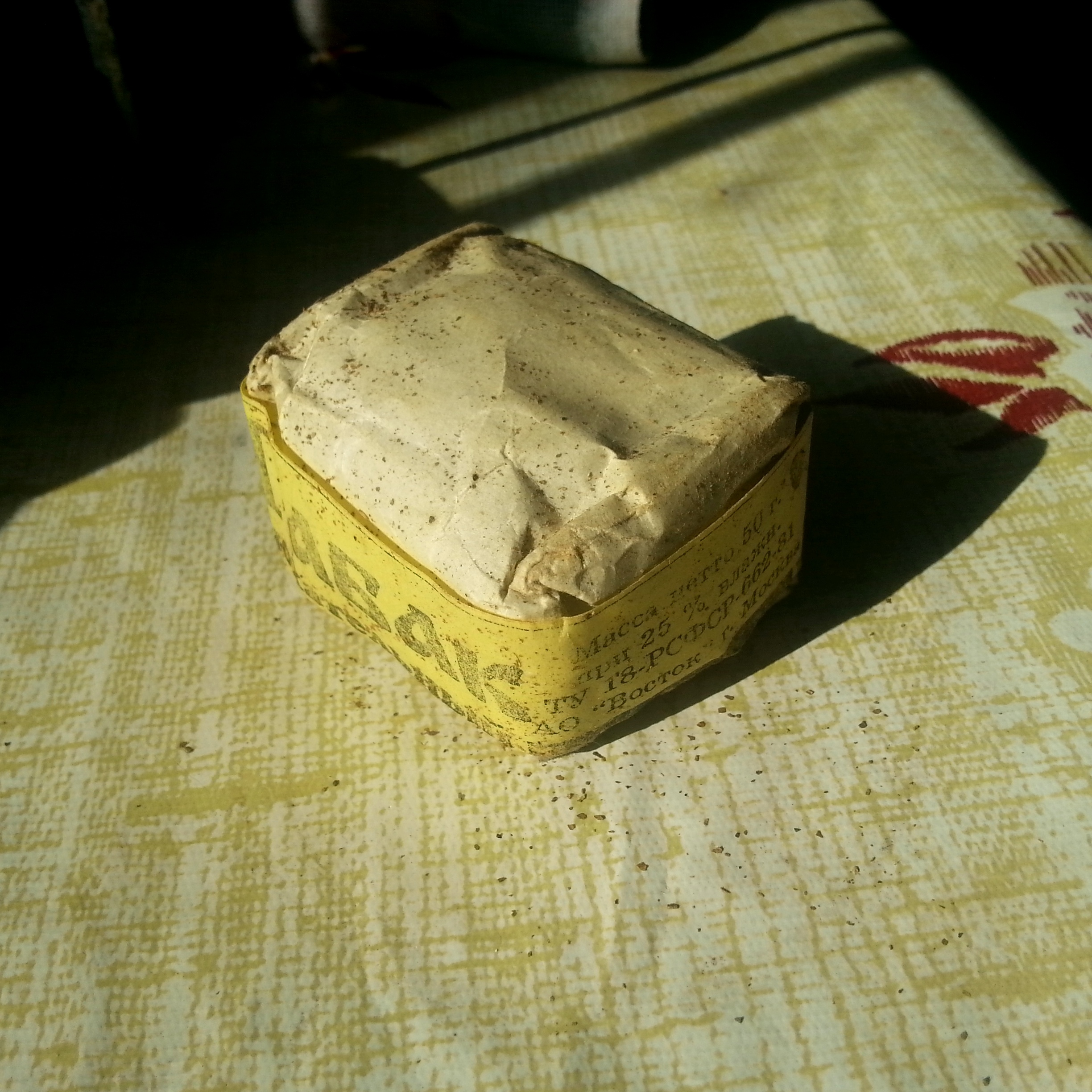 Упаковка нюхательного табака